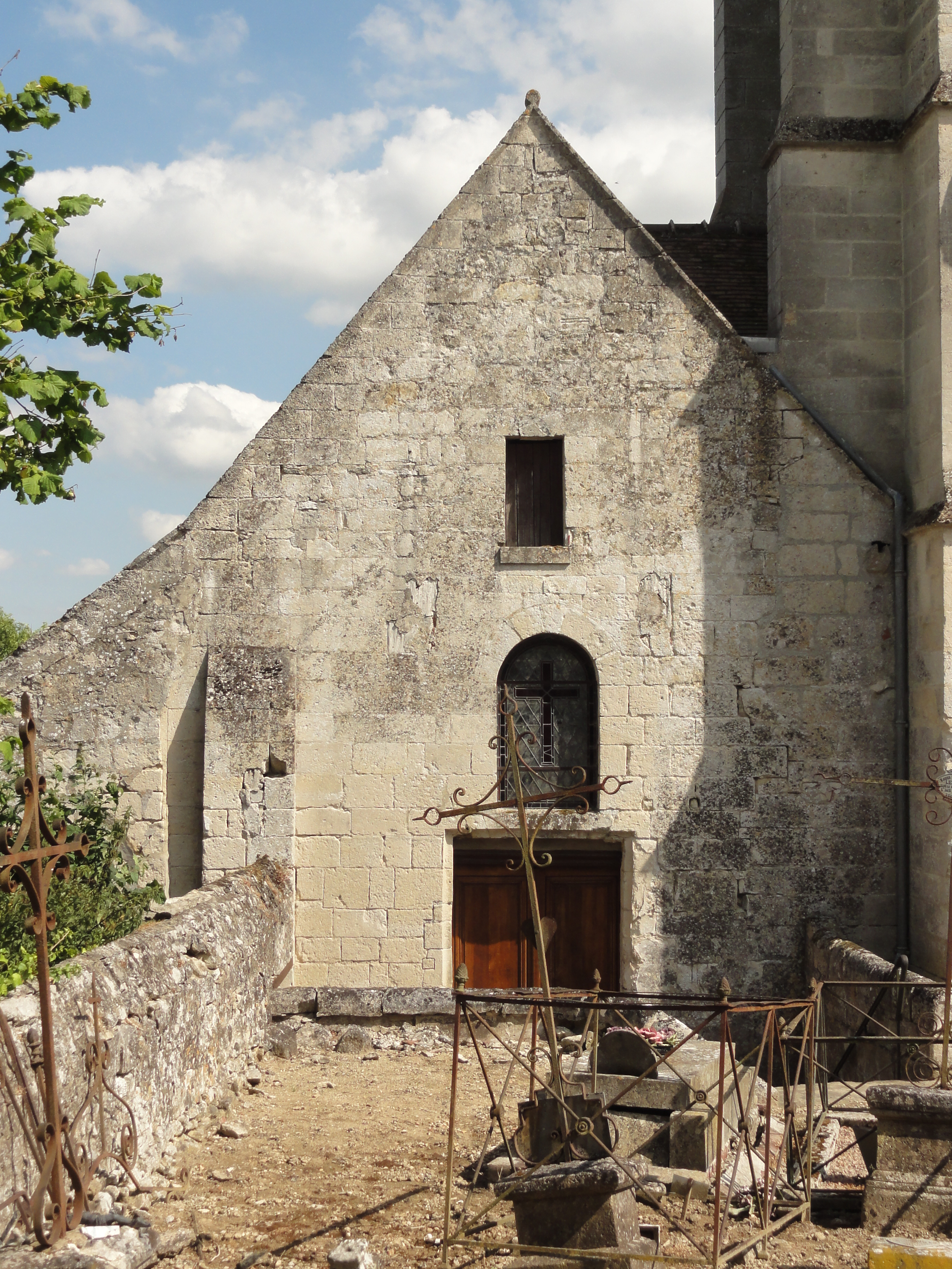 Église Saint-Laurent de Russy-Bémont (voir titre).